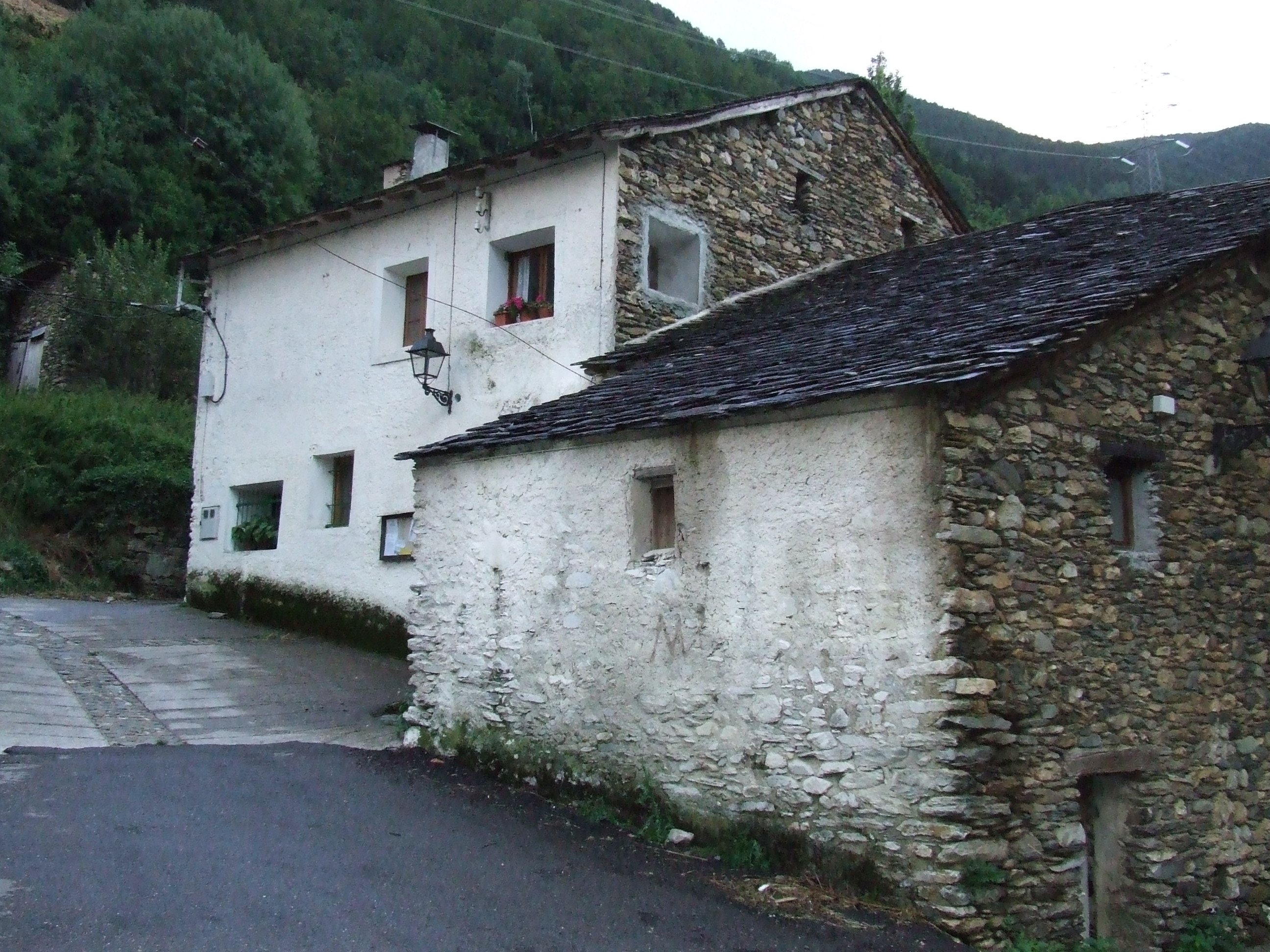 Casa Erill, d'Aiguabella (la Torre de Cabdella, Pallars Jussà)